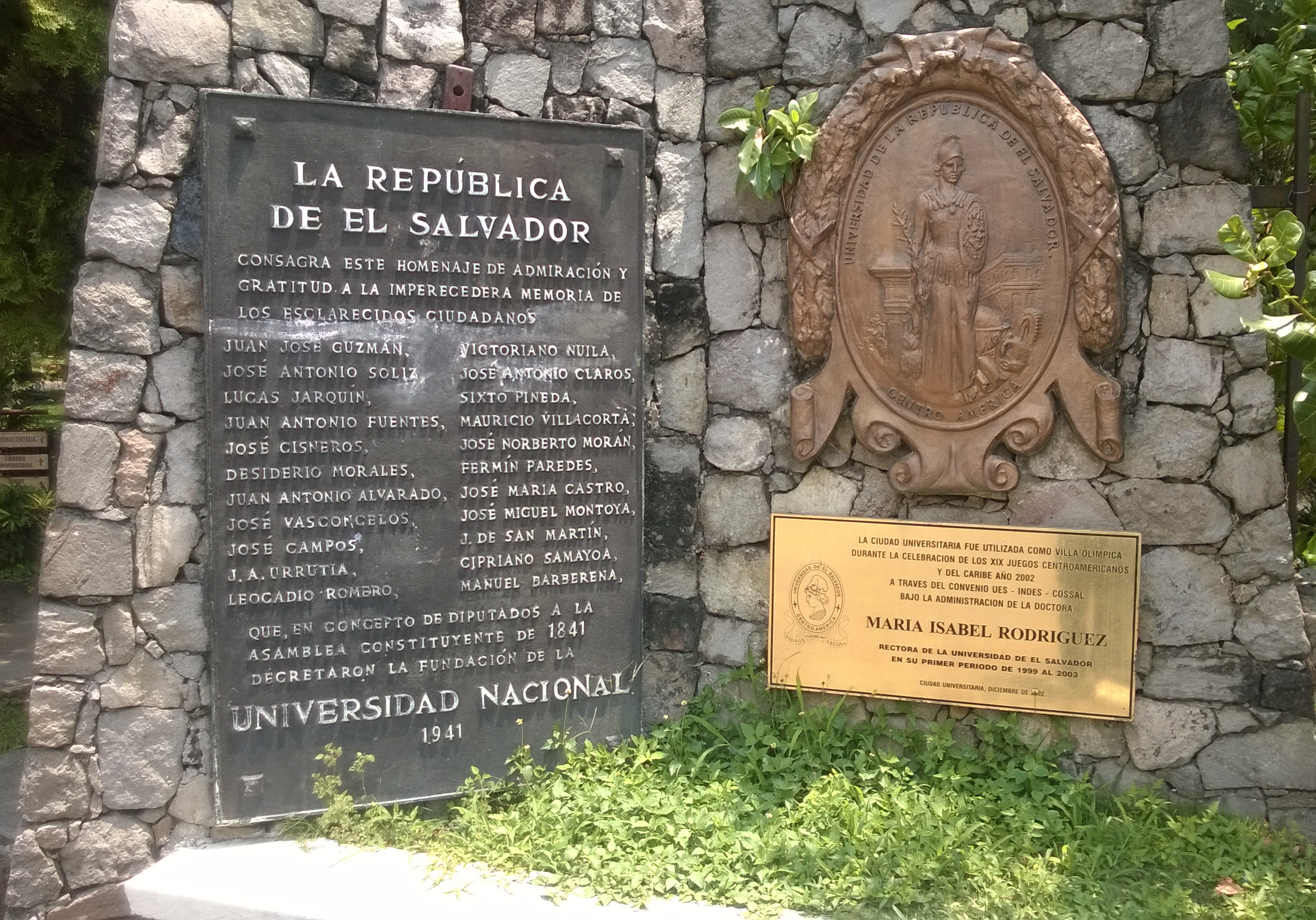 Placas de identificación ubicadas en la entrada de la Universidad de El Salvador. a) Distintivo que rememora la fundación de la universidad en 1941. b) Escudo de la UES (con la imagen de la Minerva). c) Placa de los XIX Juegos Centroamericanos y del Caribe 2002 colocada cuando María Isabel Rodríguez se desempeñaba como rectora.